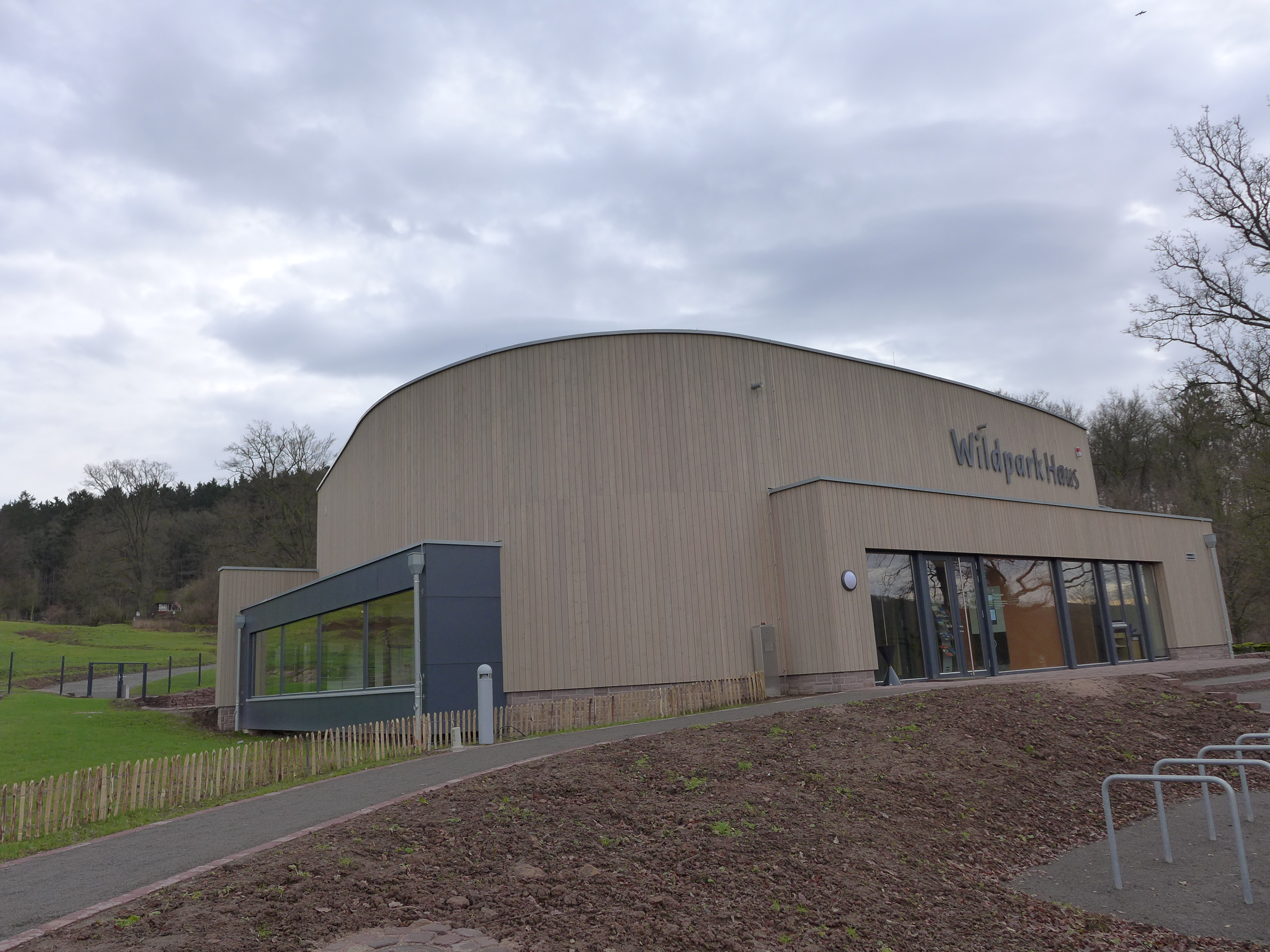 Wildpark Neuhaus, Wildparkhaus nordwestseitig